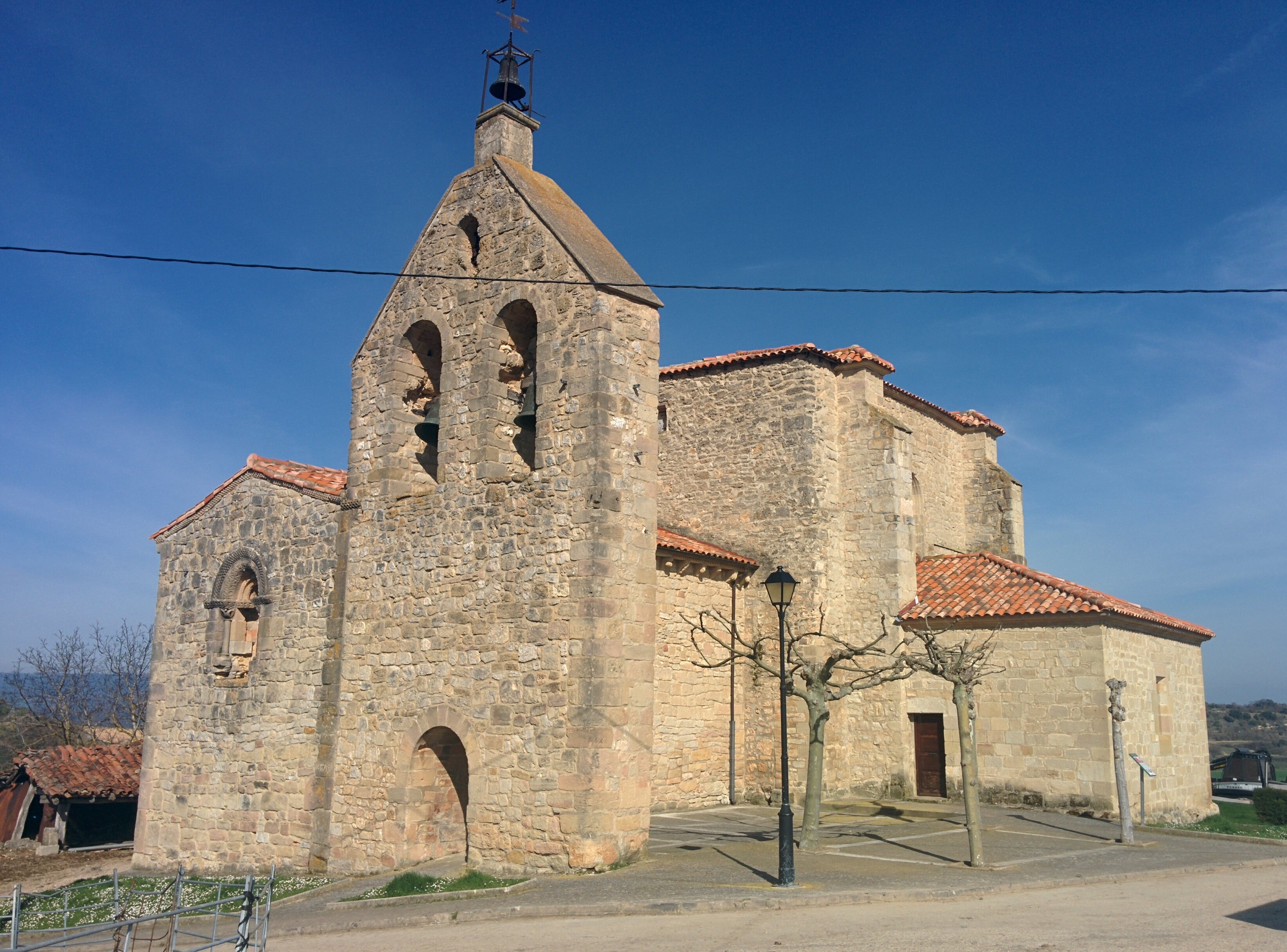 Iglesia de San Julián y Santa Basilisa, en Bozoó (Burgos, España).